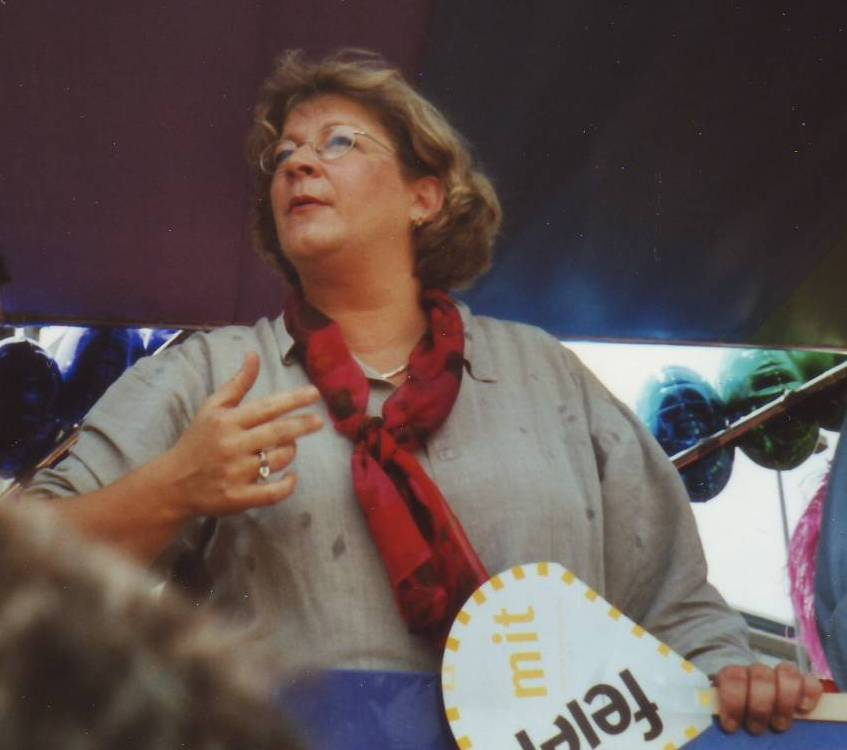 Andrea Fischer 2000 auf dem Wagen der Grünen beim Cristopher Street Day in Köln.